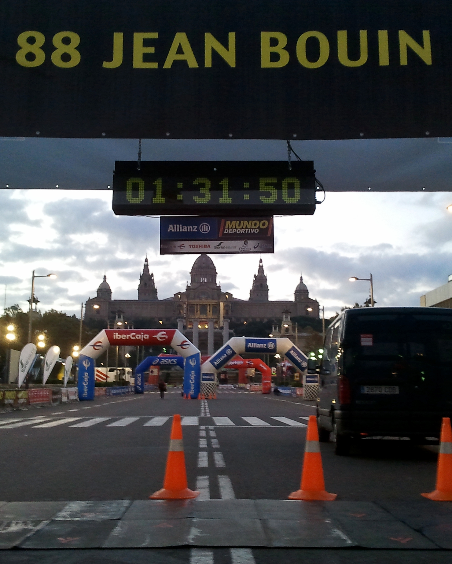 88 edición de la Carrera Jean Bouin, celebrada el 27 de noviembre de 2011 en la ciudad de Barcelona, España.